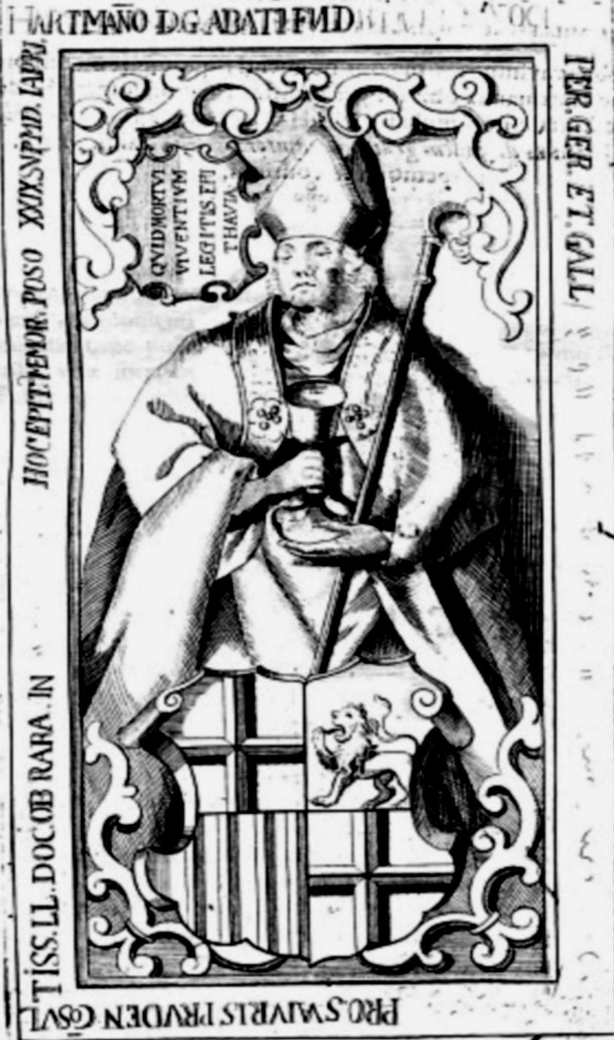 „Abt Hartmann Burggraf von Kirchberg 1529, Fulda“, Grabdenkmäler